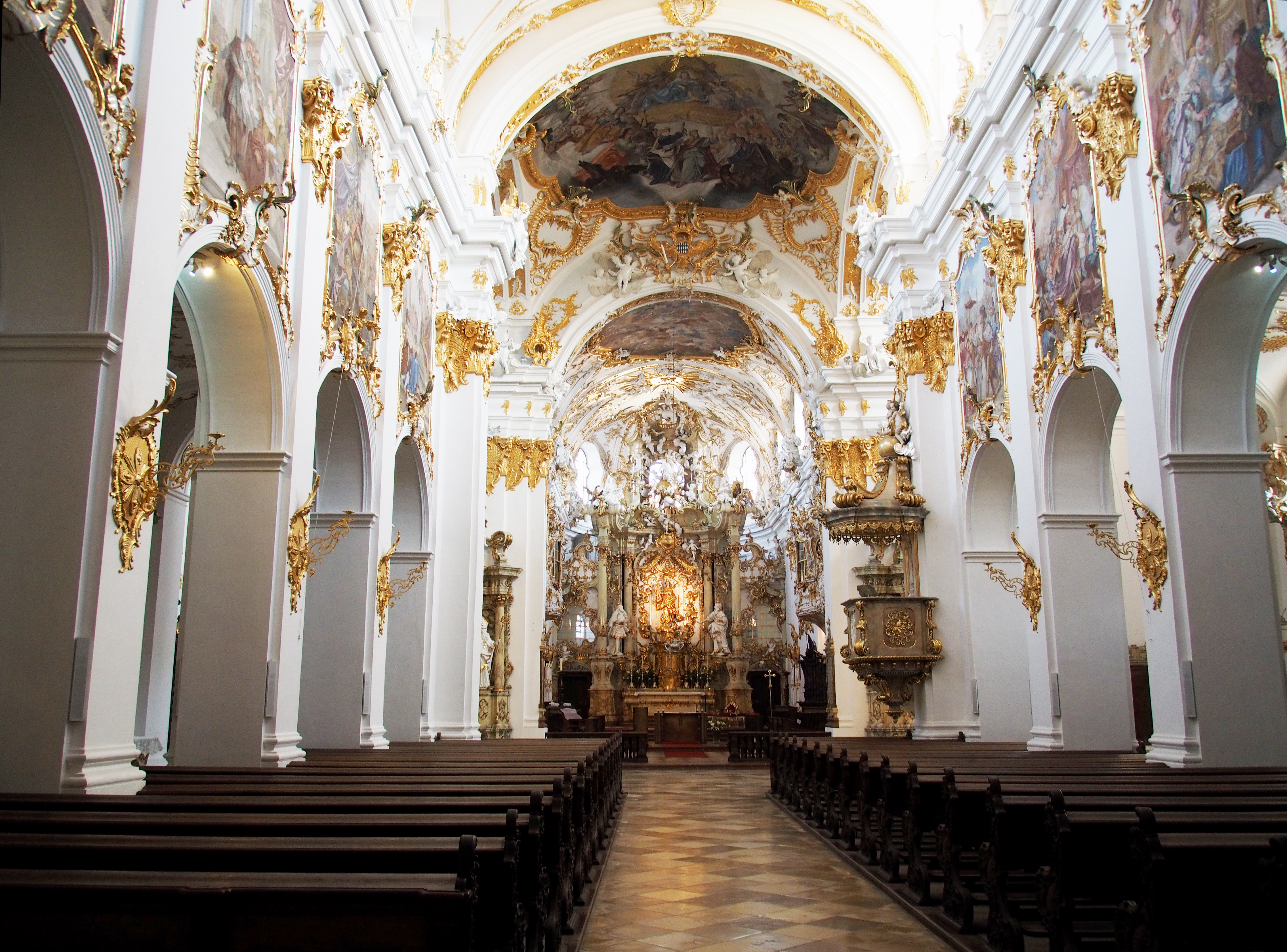 Kirchenschiff der „Alten Kapelle“ Regensburg